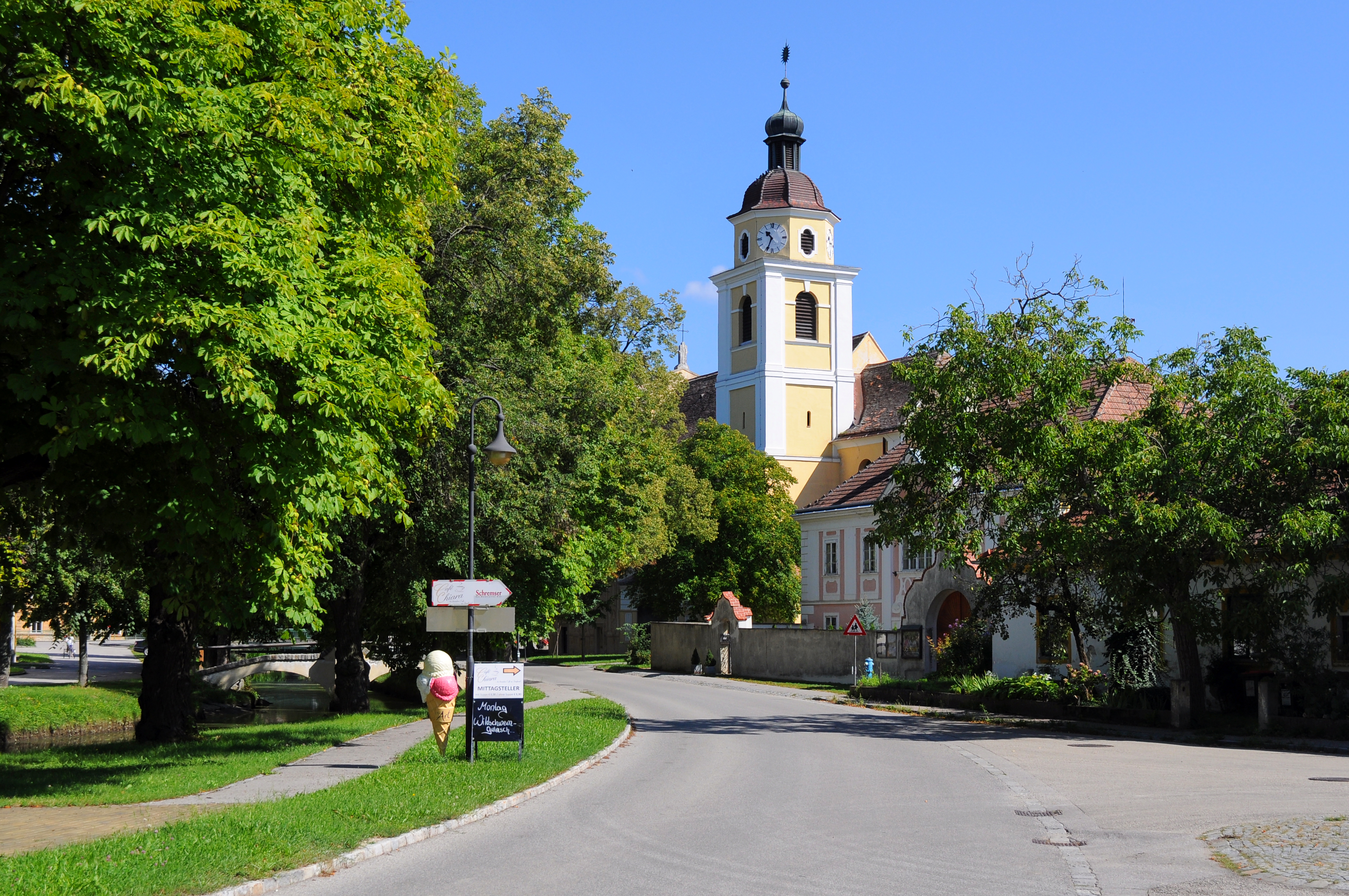 Blick vom Marktplatz auf die Pfarrkirche in Straß im Straßertale.